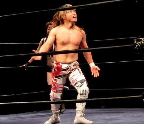 HIROSHI TANABOTA